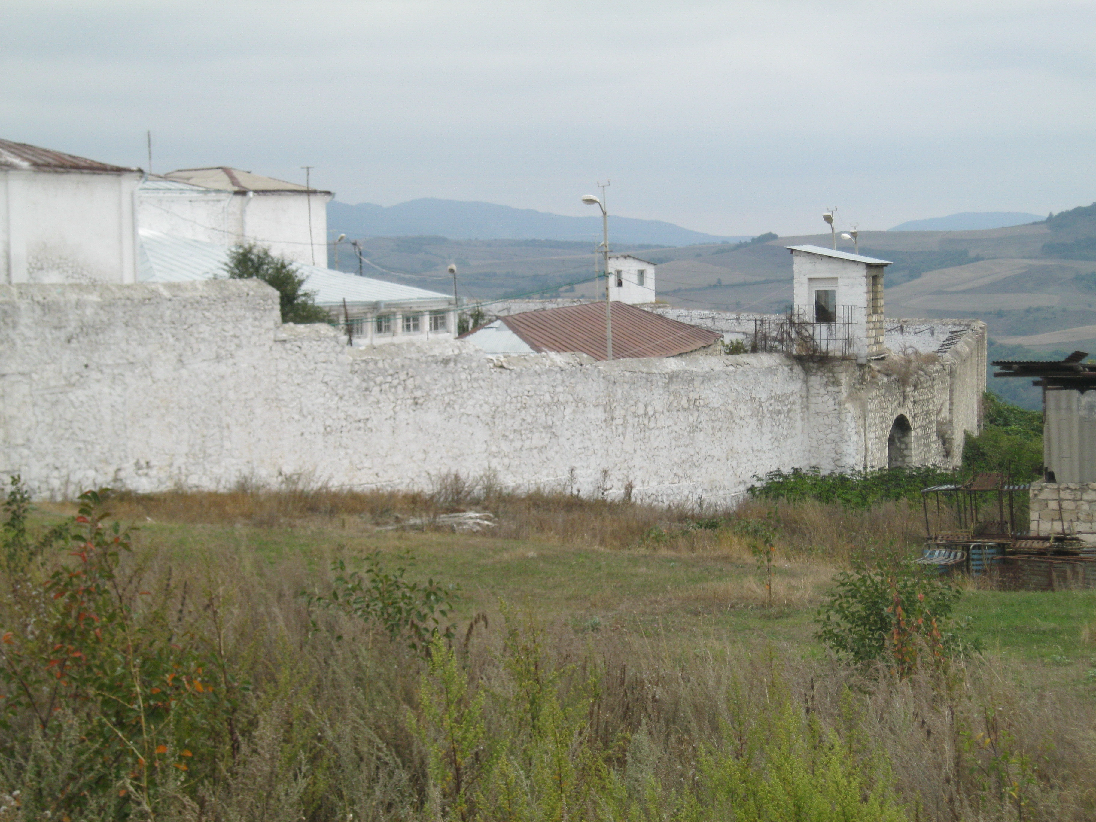 Şuşa həbsxanası